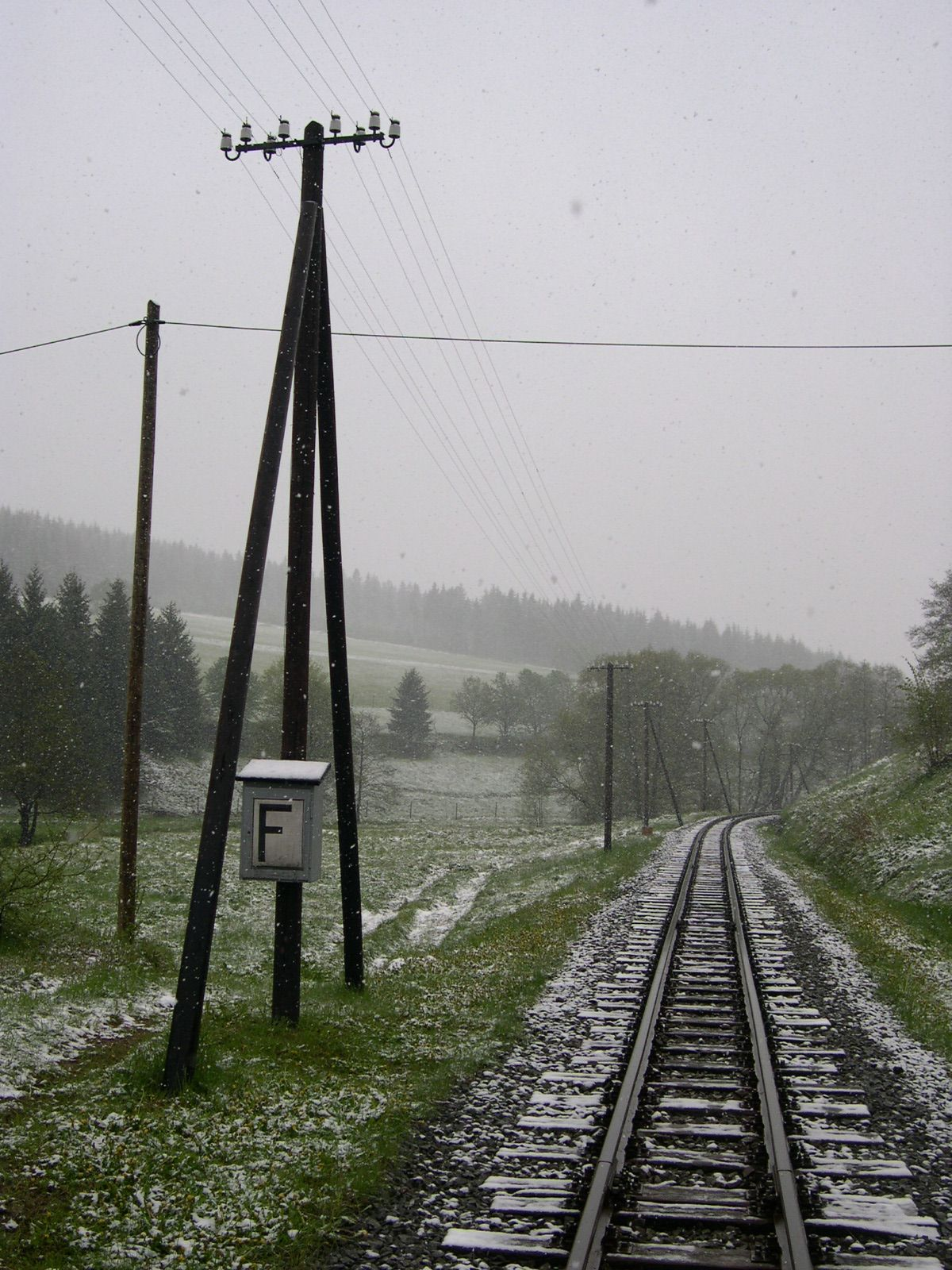 Mast der Streckenfernsprechleitung und Kasten eines Streckenfernsprechers an der Preßnitztalbahn